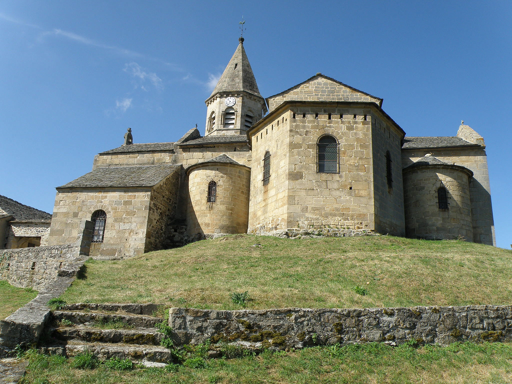 Saint-Julien-Chapteuil, comm. du dép. de la Haute-Loire, France (région Auvergne). Église Saint-Julien, chevet.